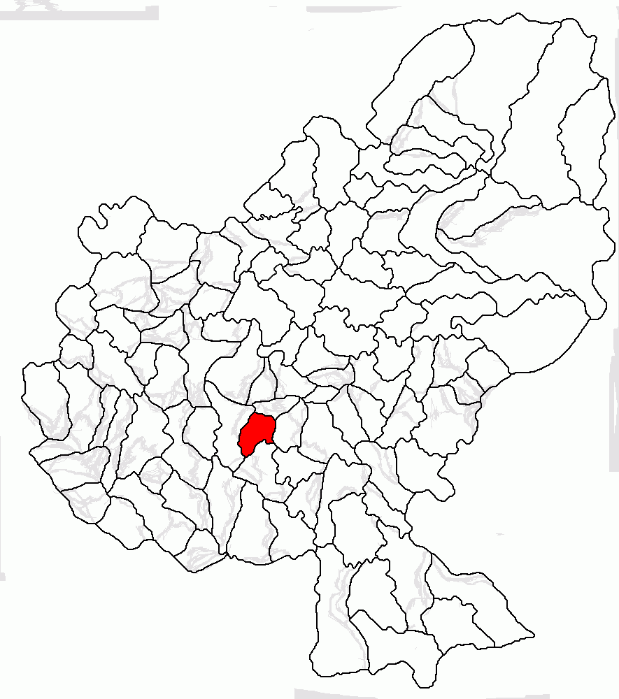 Categorie:Hărţi ale judeţului Mureş